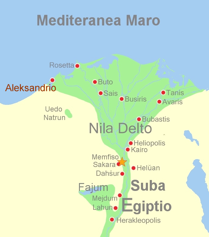 La antikva urbo Aleksandrio en Suba Egiptio Fonto: la dosiero Mapo de antikva Egiptio.jpg